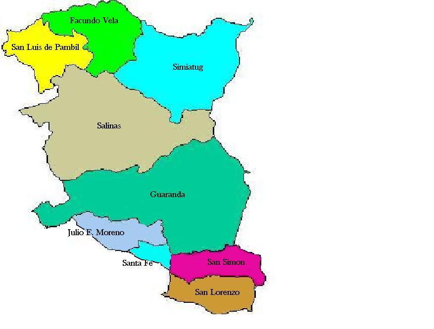 Localización de las parroquias del Cantón Guaranda en la Provincia de Bolívar, Ecuador.